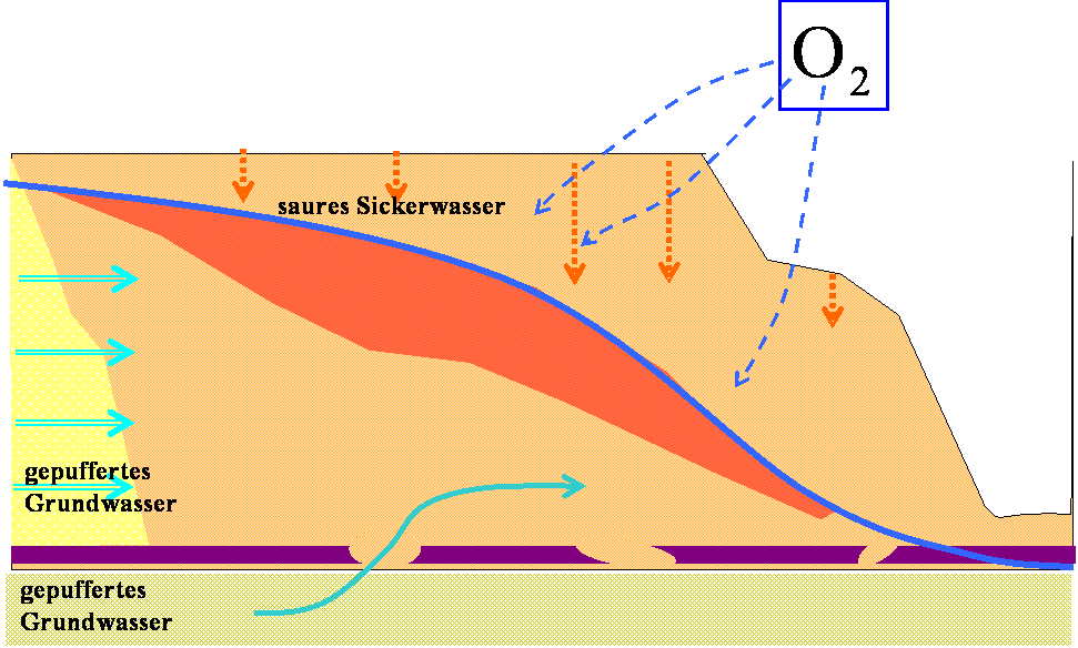 Schnitt durh eine trockene Kippe